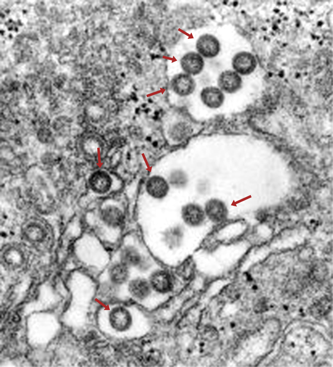 Rifttal-Fieber-Viren in infiziertem Gewebe (Transmissions-Elektronenmikroskop)